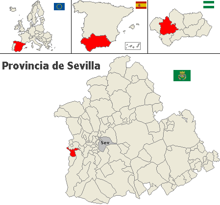 Término municipal de Pilas (Sevilla, España)